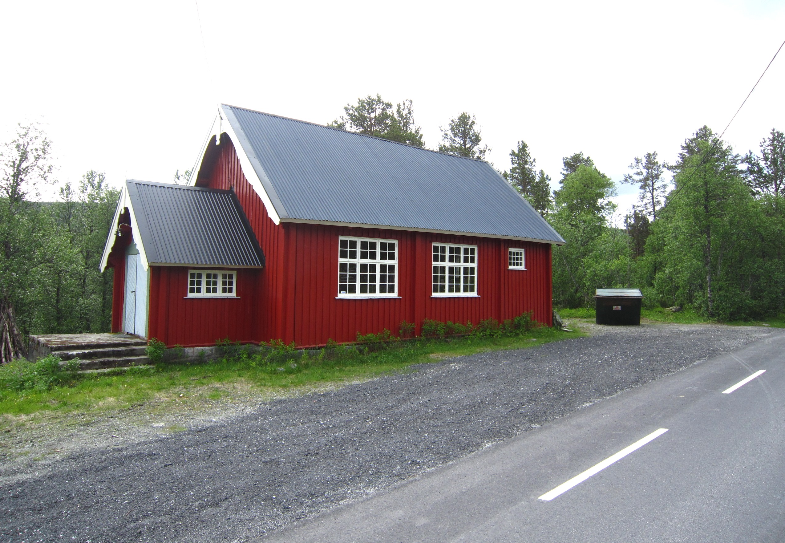 Ungdomshuset Nordvang i Vats ved fylkesvei 244